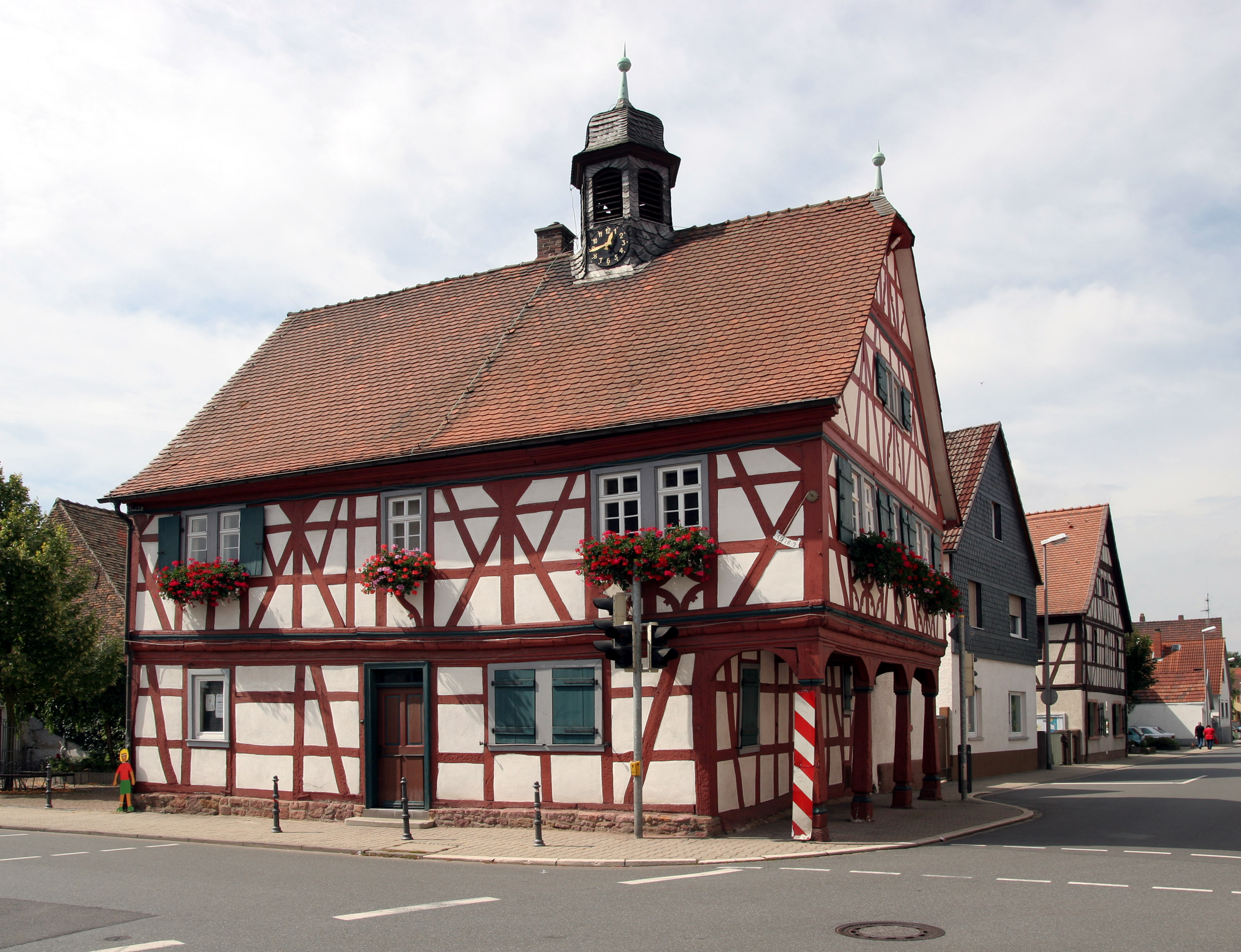 Das Alte Rathaus der Gemeinde Klein-Gerau.